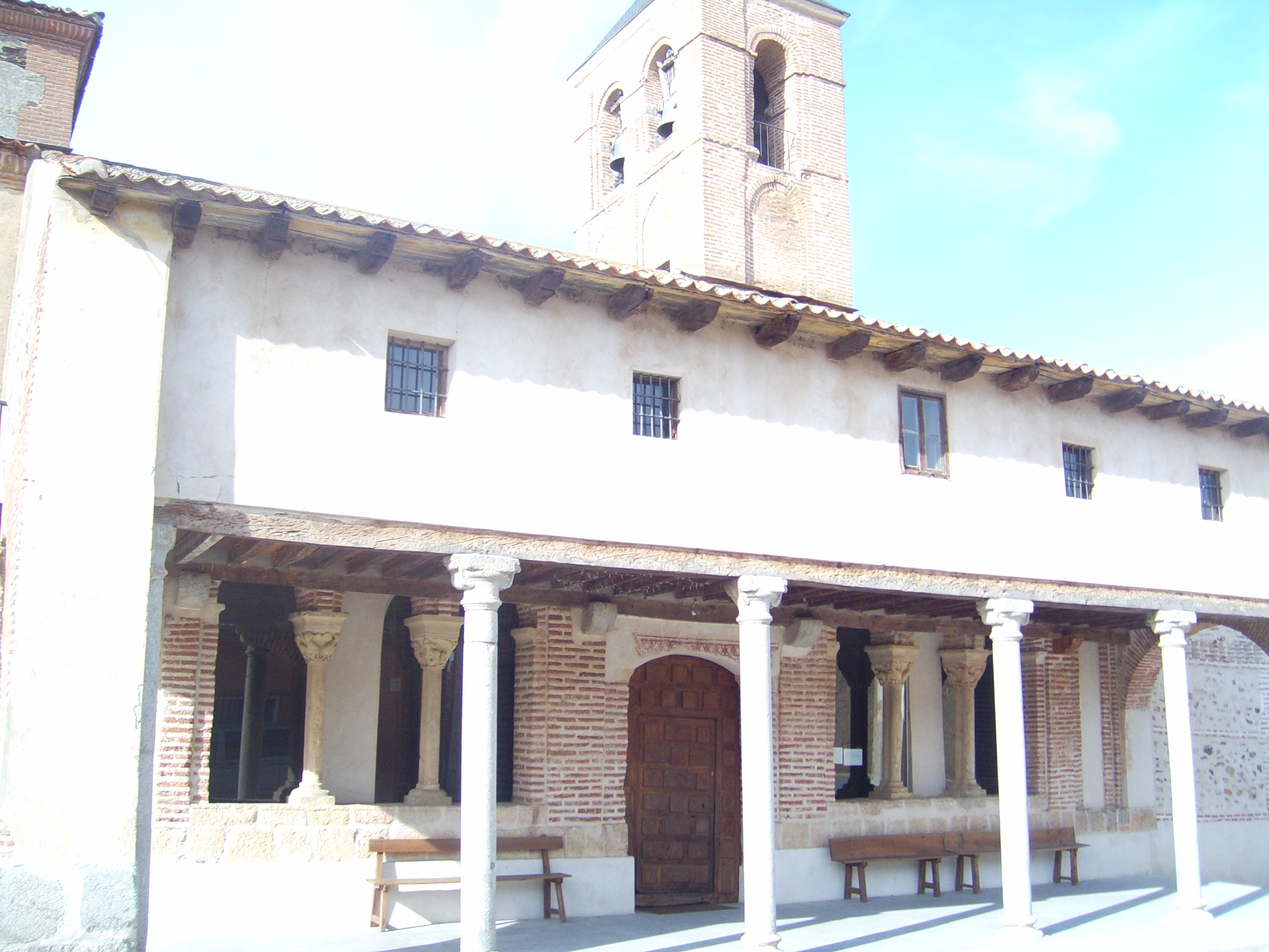 Iglesia de San Esteban, Nieva (Segovia)